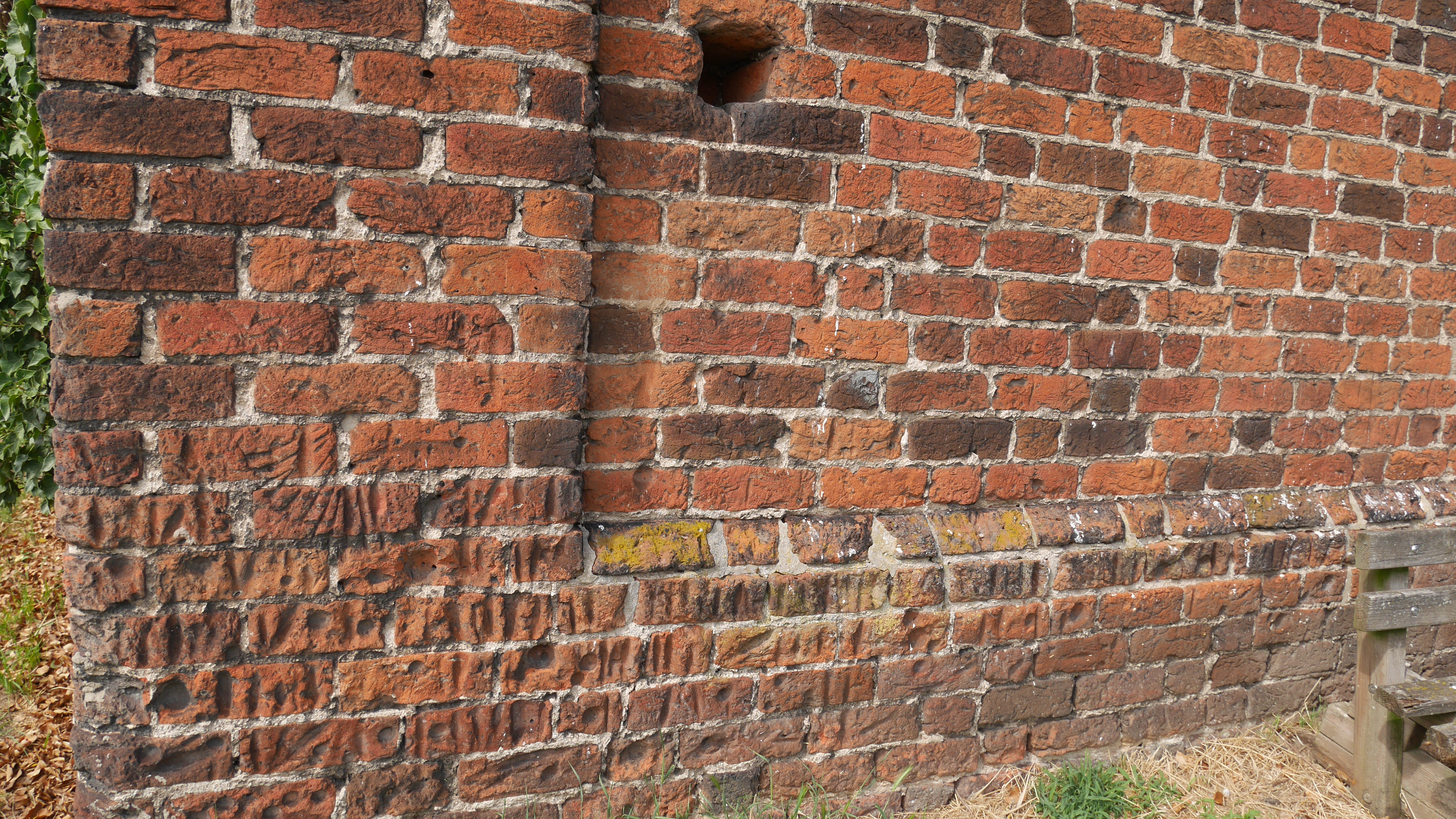 Dorfkirche Melkow Rillen